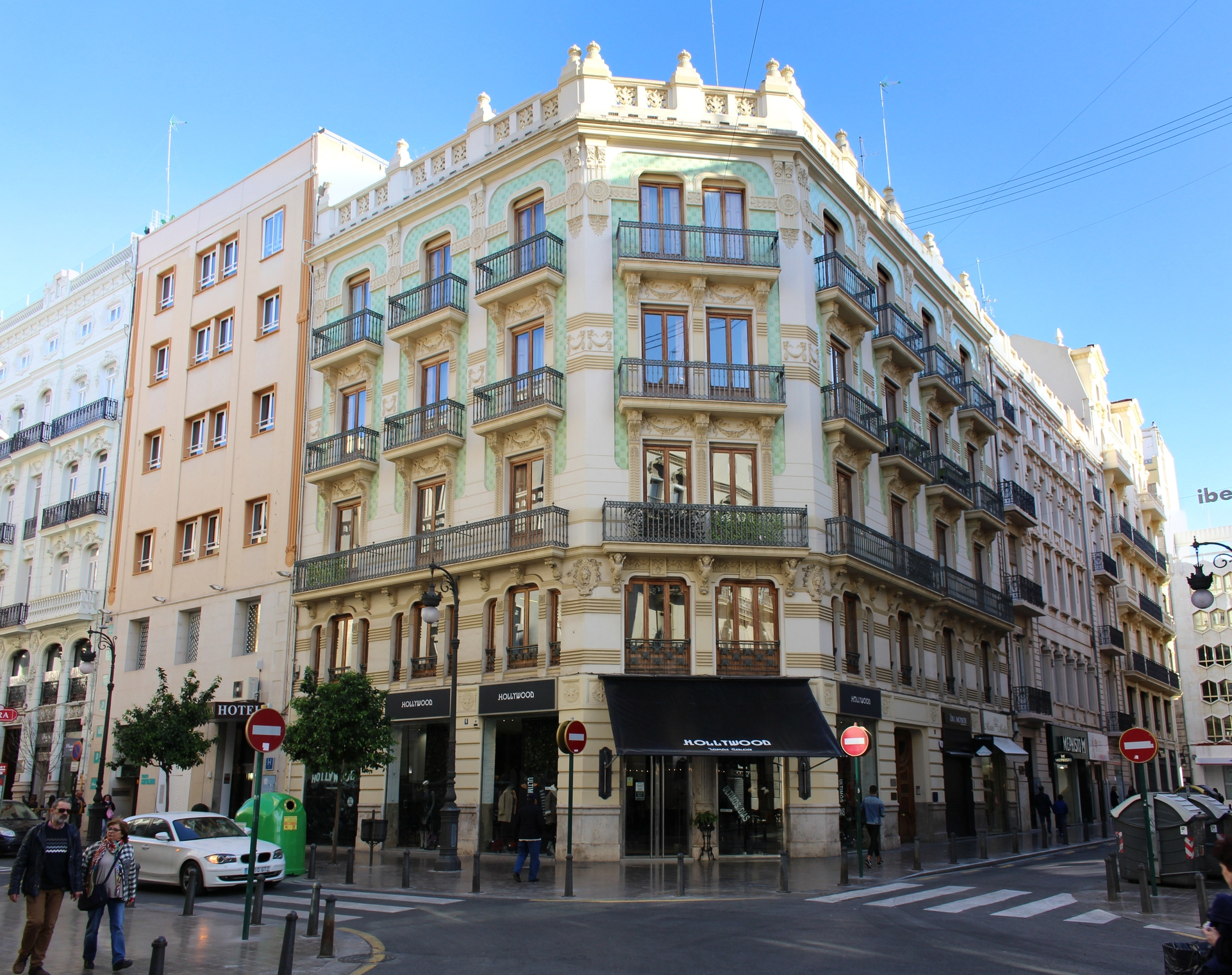 Casa Boldún (1914) obra de Antonio Martorell Trilles en la calle Pérez Pujol número 3 esquina con la calle Correos número 8 en la ciudad de Valencia